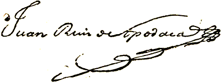 Imagen extraida del libro de Vicente Riva Palacio, Julio Zárate (1880) "México a través de los siglos" Tomo III: "La guerra de independencia" (1808 - 1821)